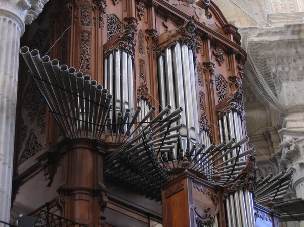 Grandes Orgues de la Cathédrale de Cadix, détail de la chamade Photo par Duomaxw (octobre 2005) Licensing Duomaxw